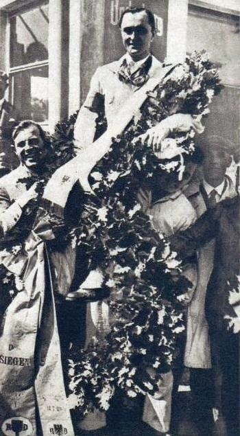 Nurburgring 1929, victoire de Louis Chiron sur Bugatti T35C.